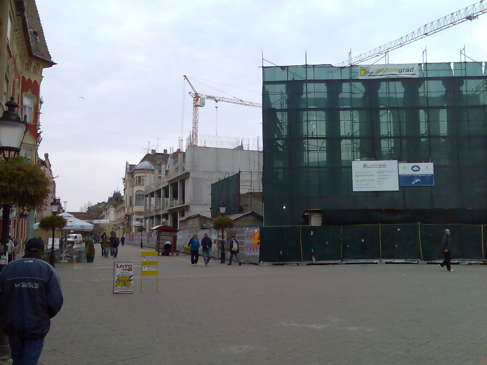 Суботичко Народно Позориште